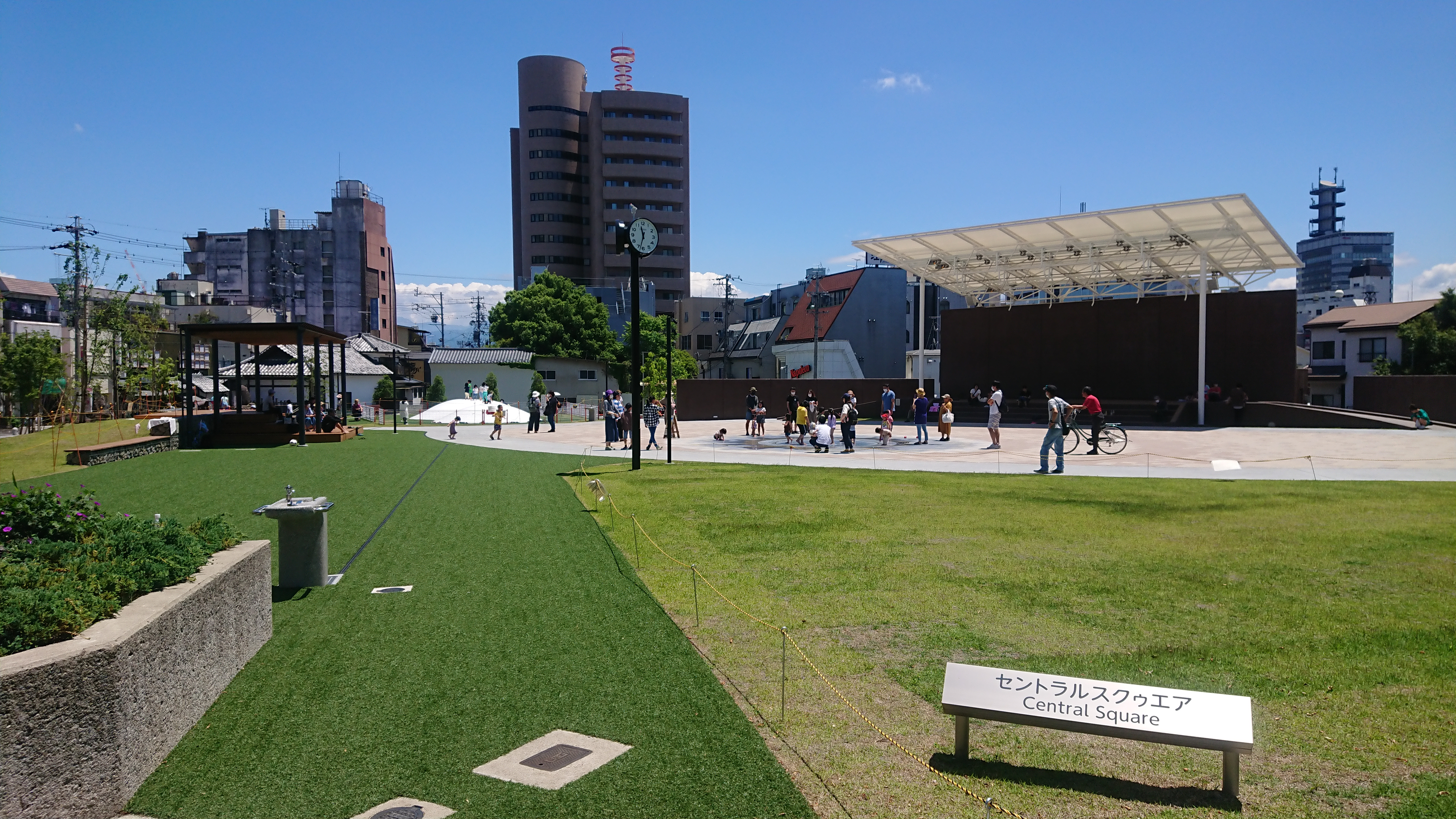 セントラルスクゥエア（園内全景）